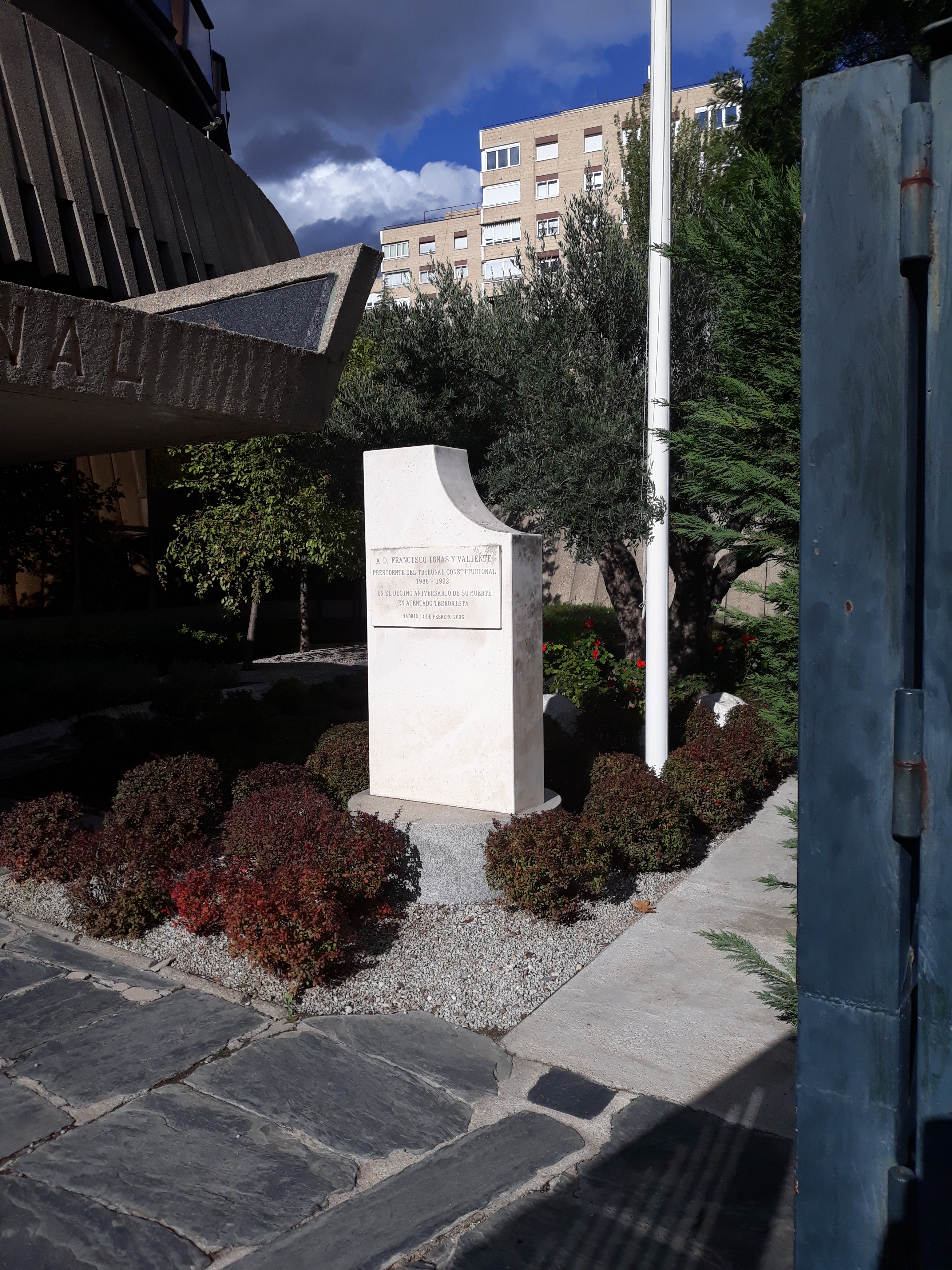 Denkmal für den spanischen Juristen Francisco Tomas y Valiente (Präsident des Verfassungsgerichtshofes, Opfer des Terrorismus) vor dem spanischen Verfassungsgerichtshof in Madrid.